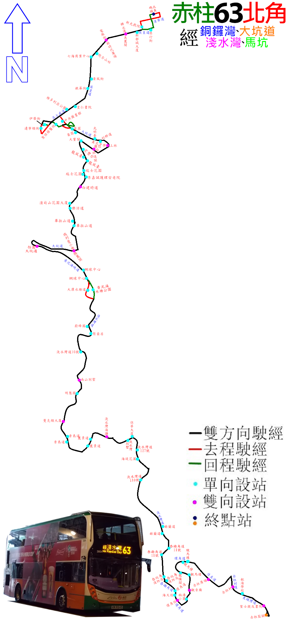 中文（香港）: 新巴63線的走線圖